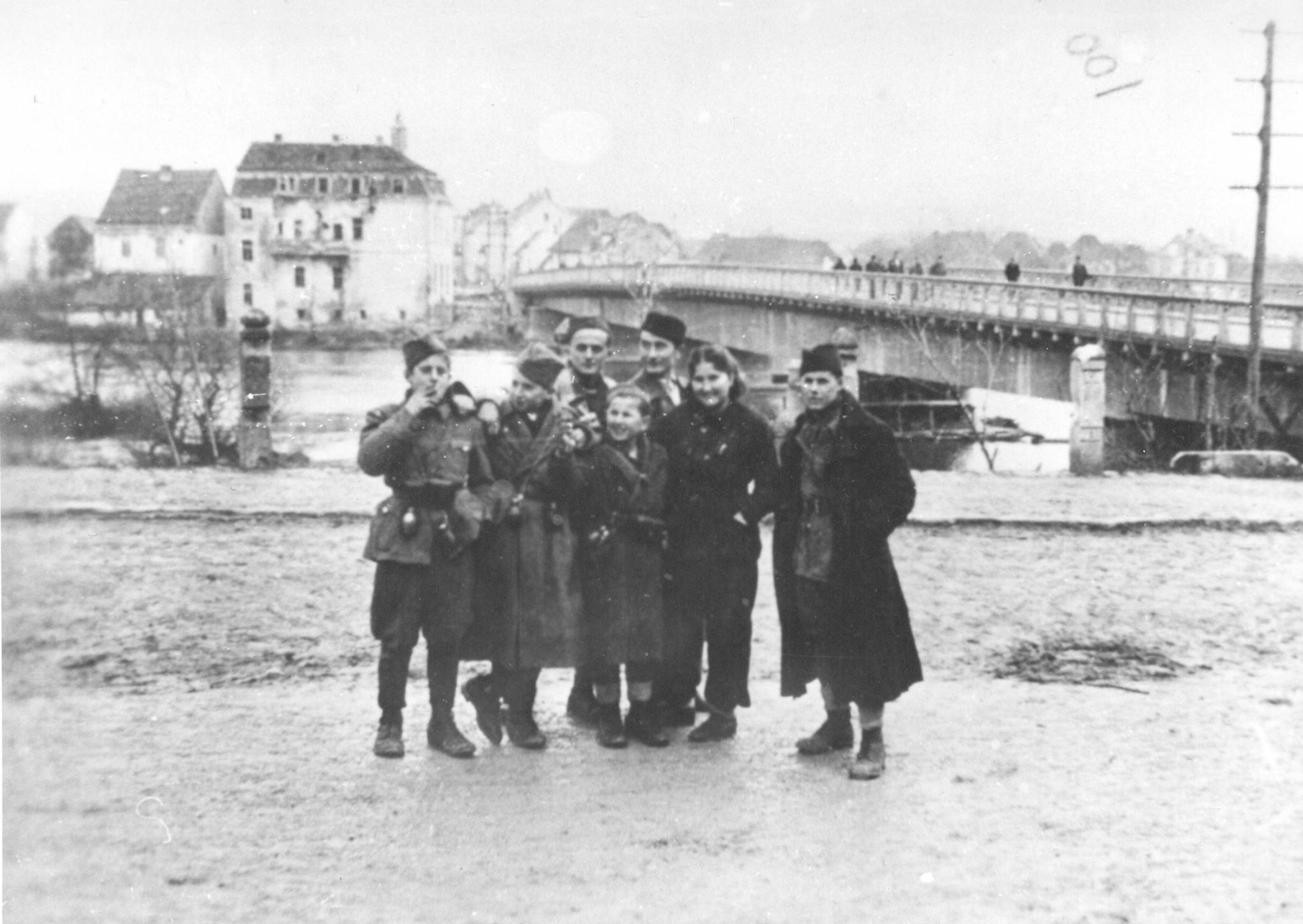 Deo delegacije Druge proleterske brigade na Kongresu USAOJ-a u Bihaću, decembra 1942. godine